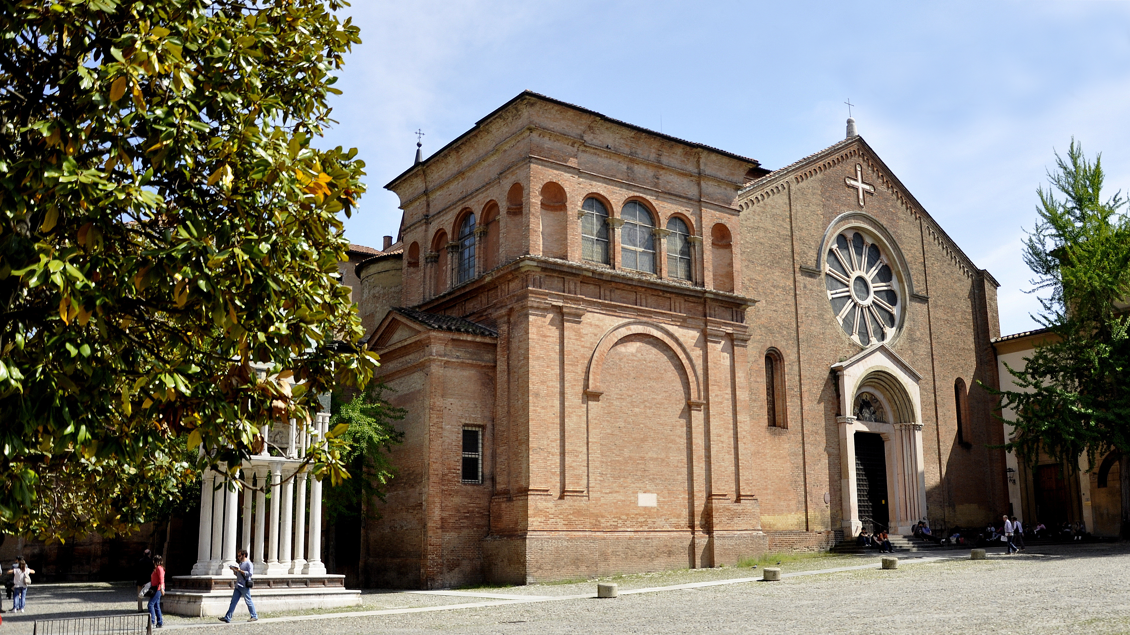 De basiliek van San Domenico in Bologna (Italië) met links het graf van Rolandino de Passeggeri